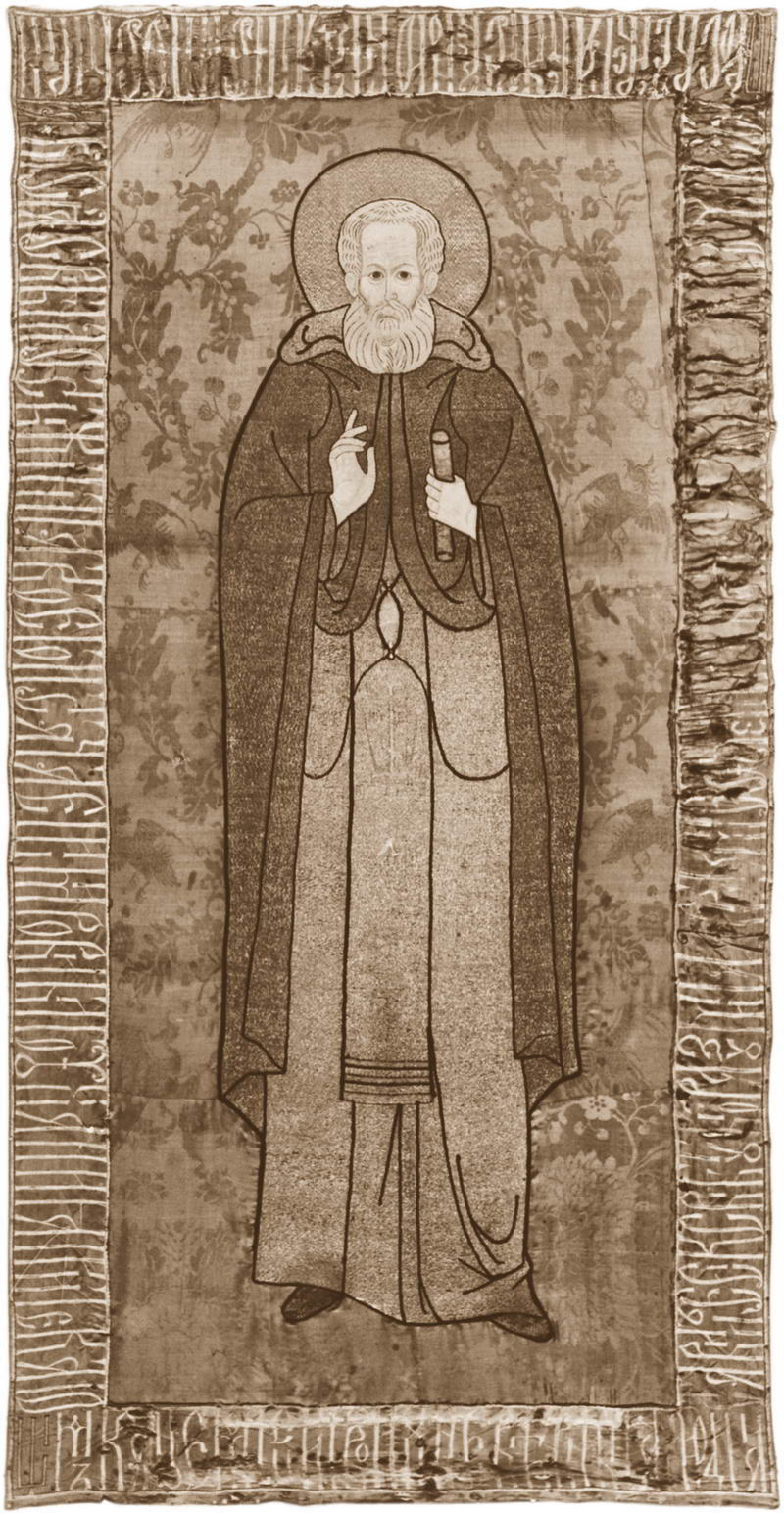 Un velo del XVI secolo che sarebbe stato rinvenuto, secondo l'agiografia, nella tomba di Abramo di Rostov in una foto a colori del 1902 scattata a Rostov da Sergej Prokudin-Gorskij